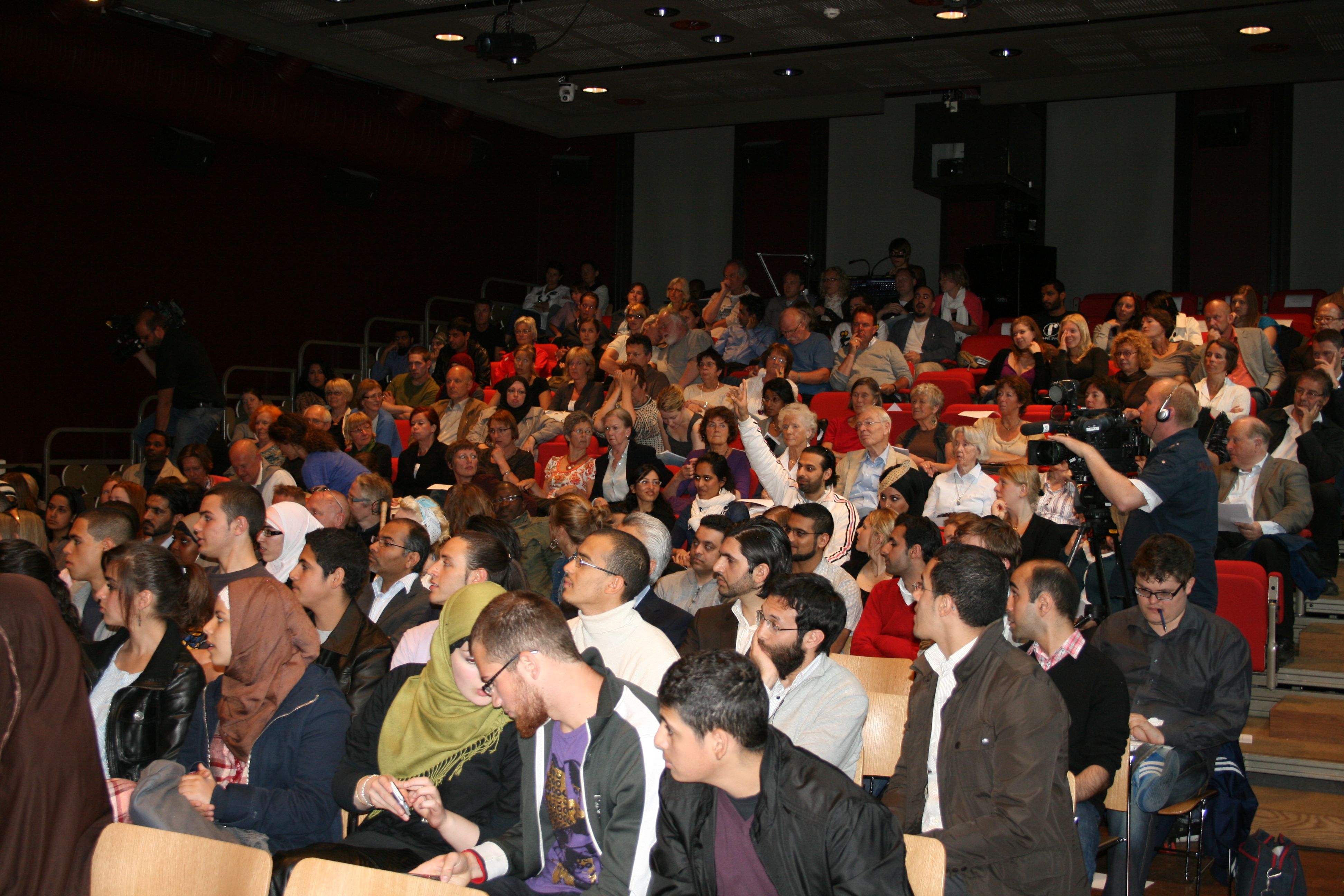 Dialogmøte om imamenes samfunnsansvar i Wergeland-salen på Litteraturhuset, søndag 7. juni 2009.